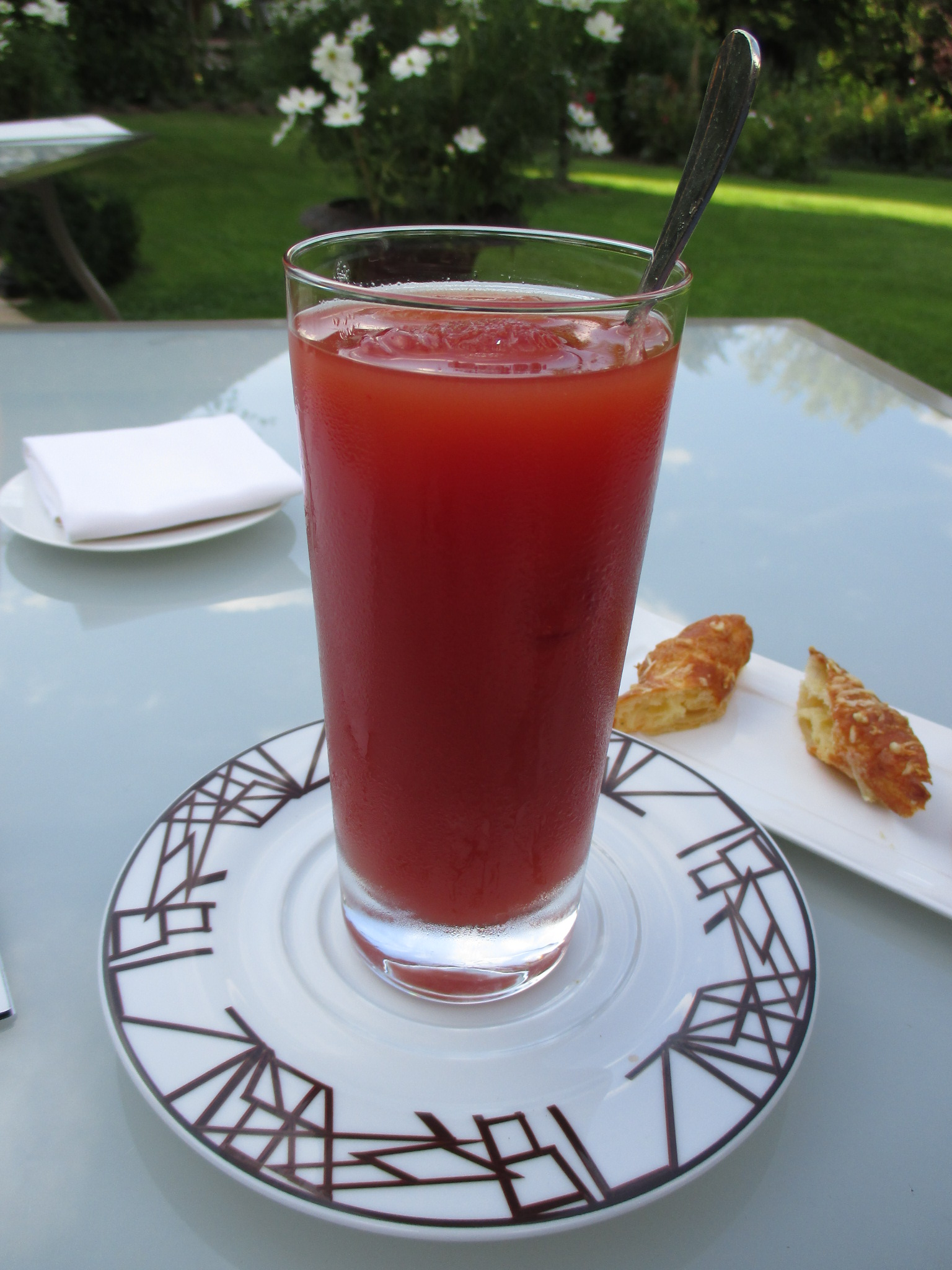 Bloody Mary